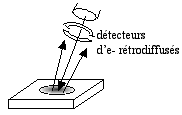 détection des électrons rétrodiffusés dans un microscope électronique à balayage